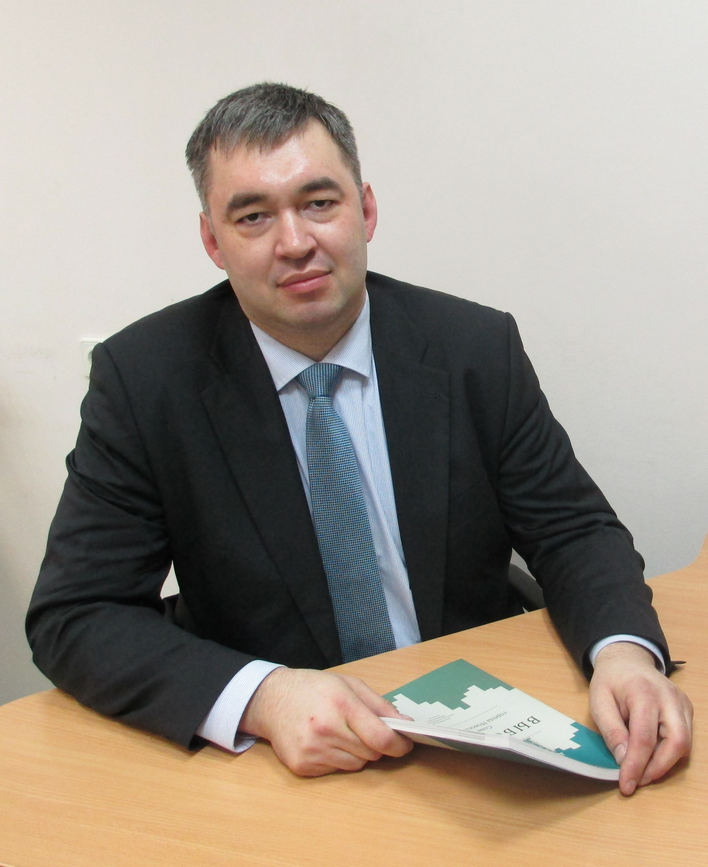 Макарцев